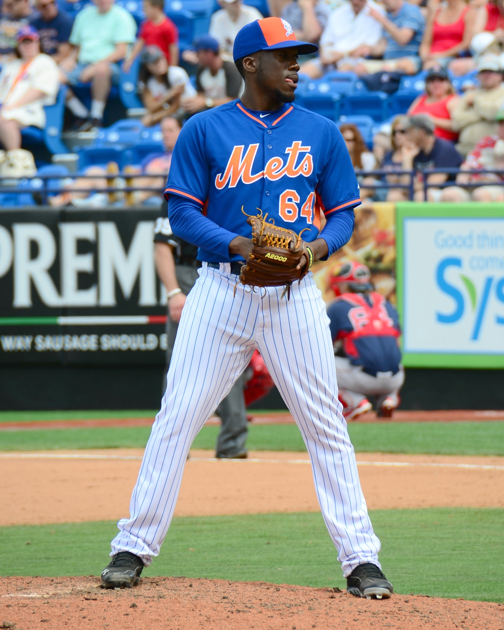 Akeel Morris